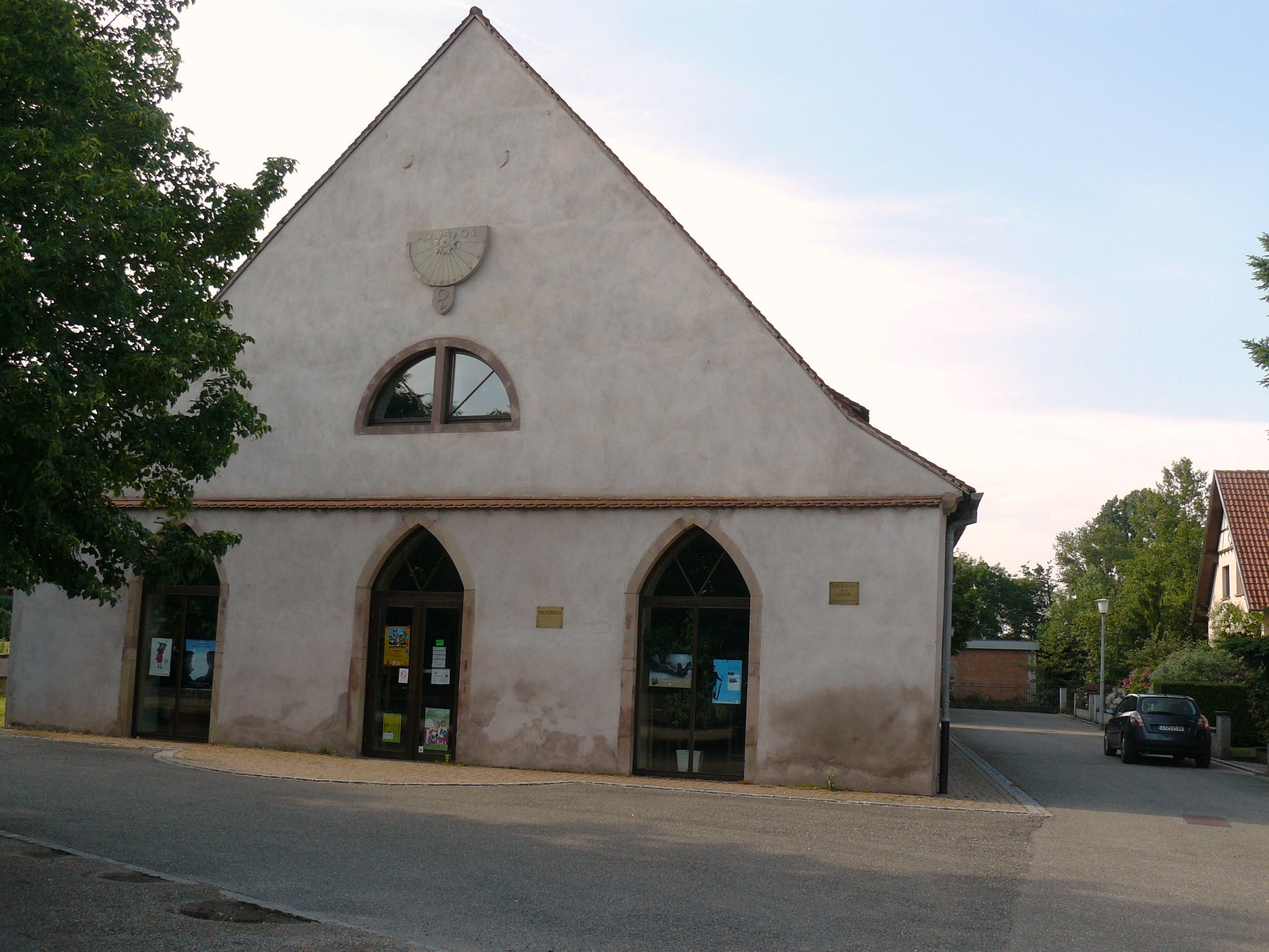 Ancienne grange dimière